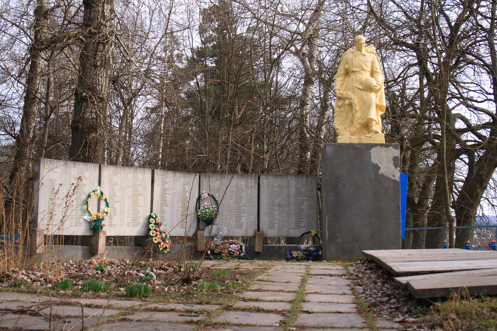 Микулинці